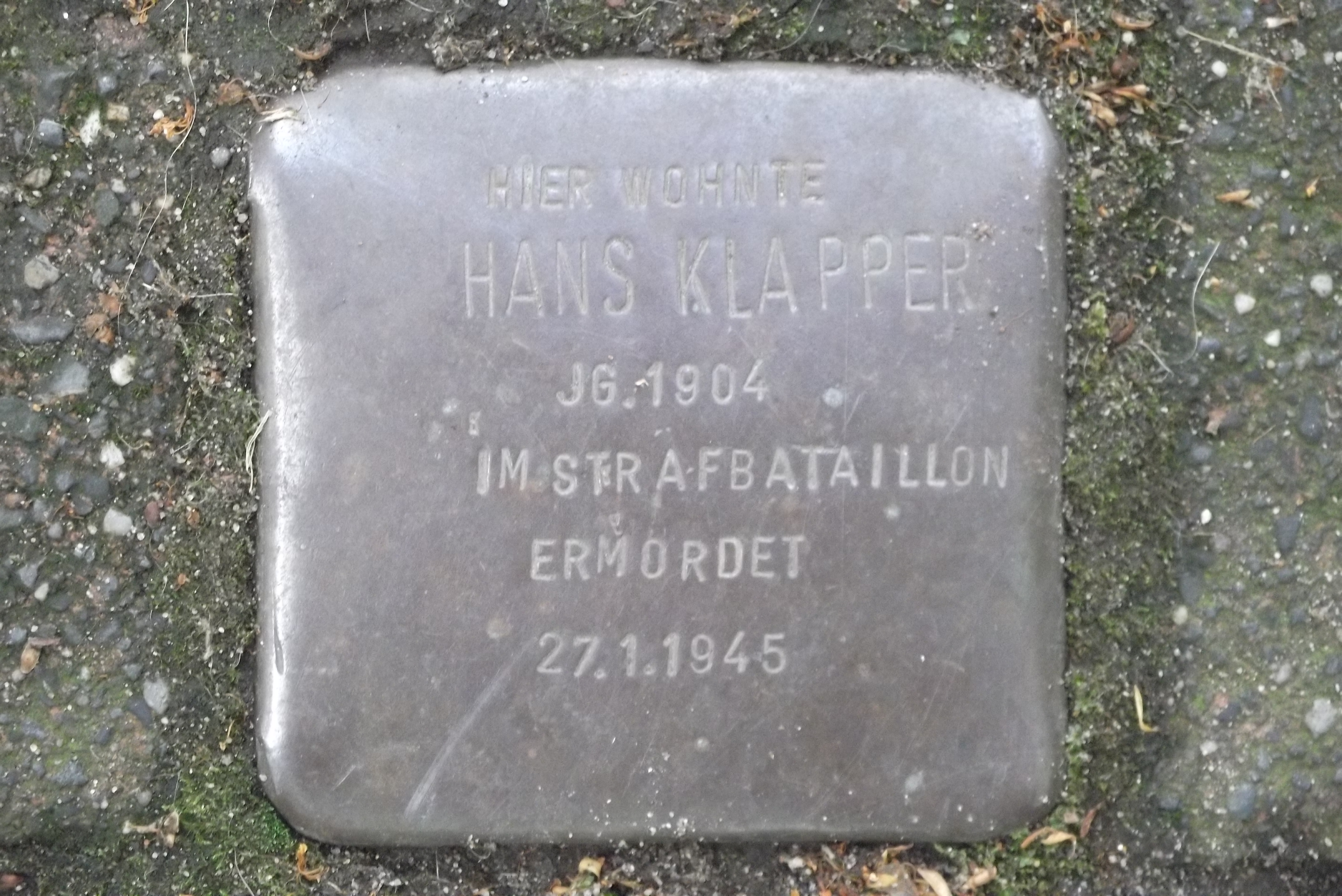 Hier wohnte Hans Klapper, Jg.1904, im Strafbataillon, ermordet 27.1.1945